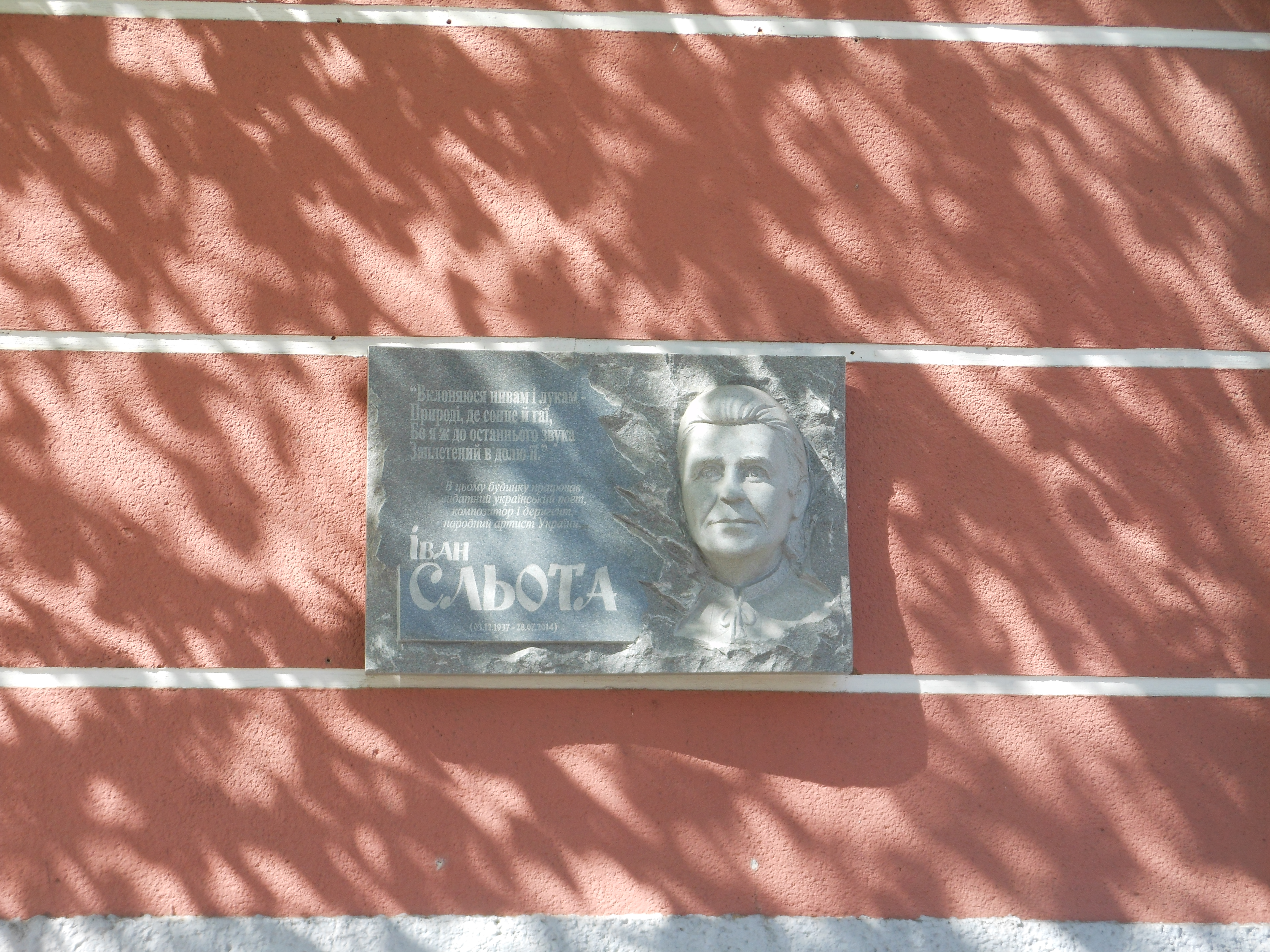 Будинок Російського музичного товариства, Житомир, вул. Михайлівська, 7